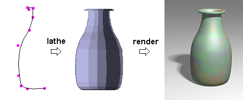 Een 3D-demonstratie van lathe. De ontwerper hoeft maar een paar punten te plaatsen (hier tien), waarmee een vaas gemaakt kan worden. De vaas in dit voorbeeld is dunwandig. Om een realistische vaas van glas te maken zou de wand van de vaas een bepaalde dikte moeten hebben. Dit is eigen werk, gemaakt met open source programma "Art Of Illusion"